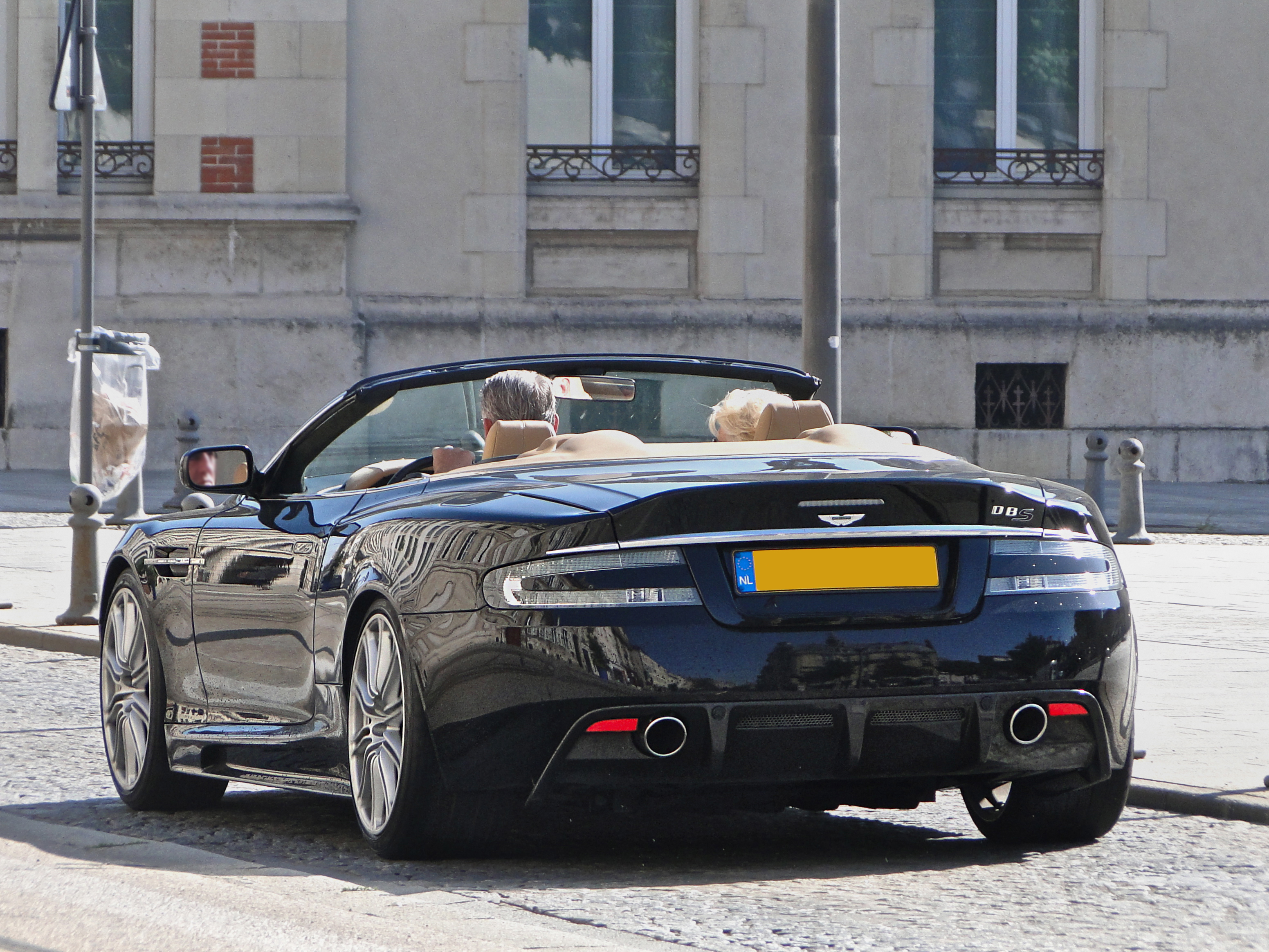 Caractéristiques Constructeur : Aston Martin Années de production : 2009 - Moteur et transmission Moteur : V12 Cylindrée : 5 935 cm3 Puissance maximale : 517 ch (380 kW) Poids et performances Poids : 1 810 kg Vitesse maximale : 305 km/h Accélération : 0 à 100 km/h en 4,3 s